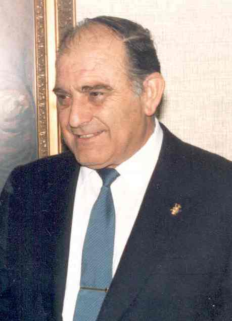 Nicolás Linares Navarro